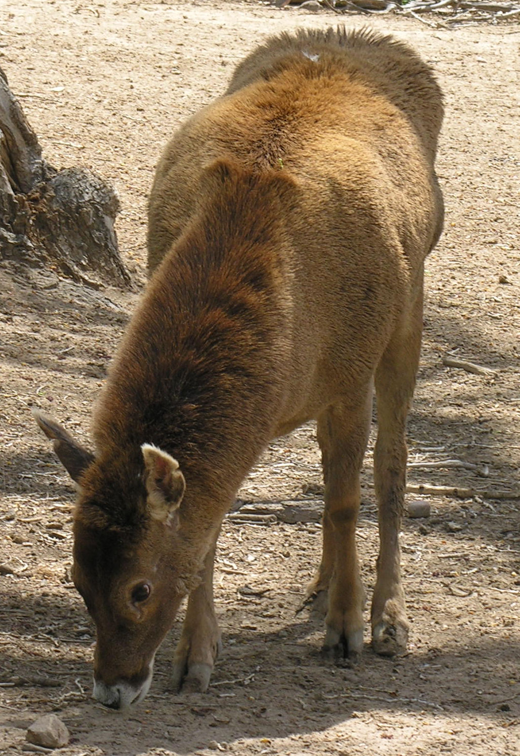 White-lipped deer, Denver Zoo, Colorado, 2006